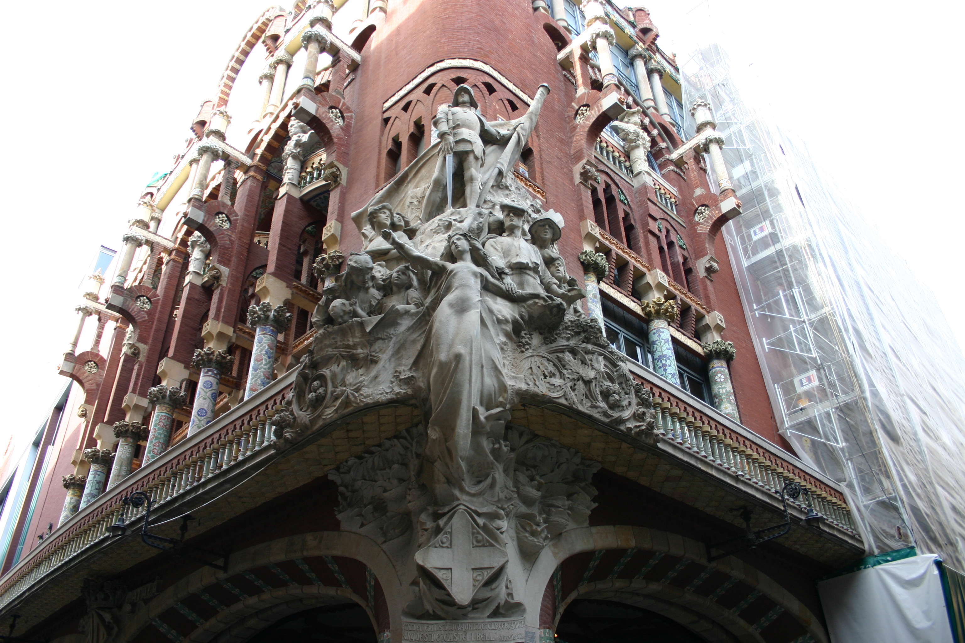 Palau de la Música Catalana. Arquitecte:Lluís Domènech i Montaner. Sculptor:Miquel Blay